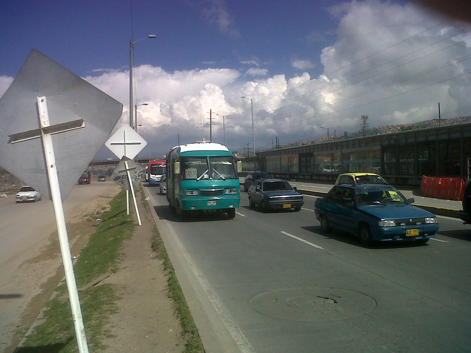 Bus que va en destino al barrio Las Vegas de Soacha procedente de Bogotá